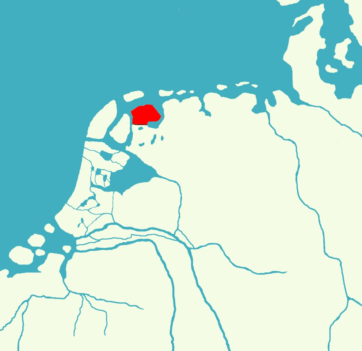 Ligging van Westergo in het Frankische Rijk